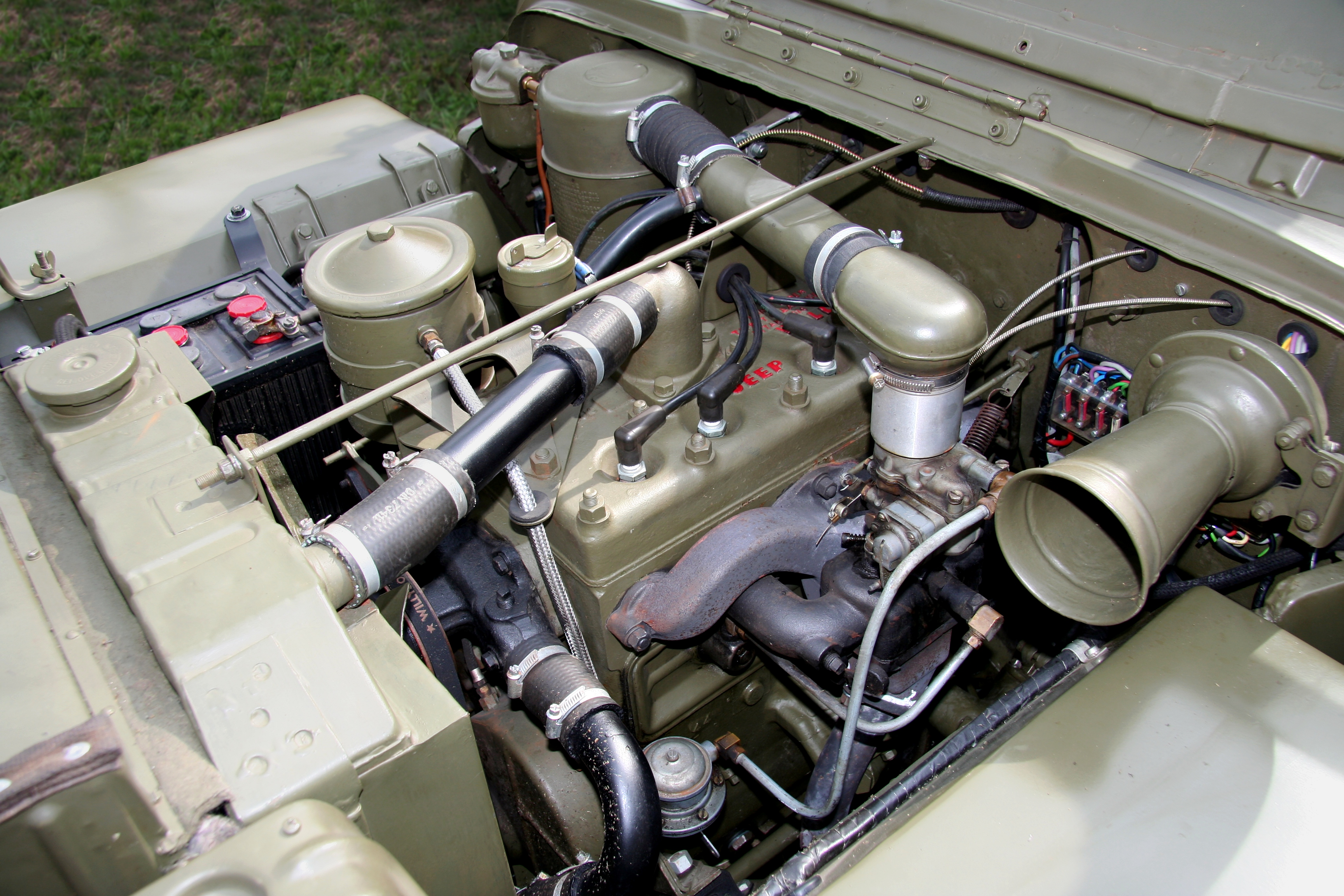 Willys MB, Baujahr 1944, Motor